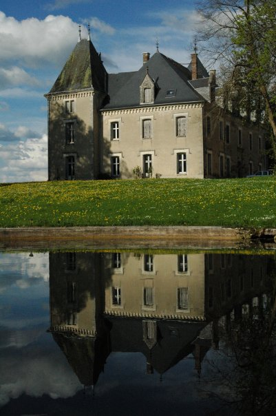 Chateau de Forsac, Benayes, Limousin